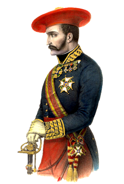 Tomas Zumalacarregui